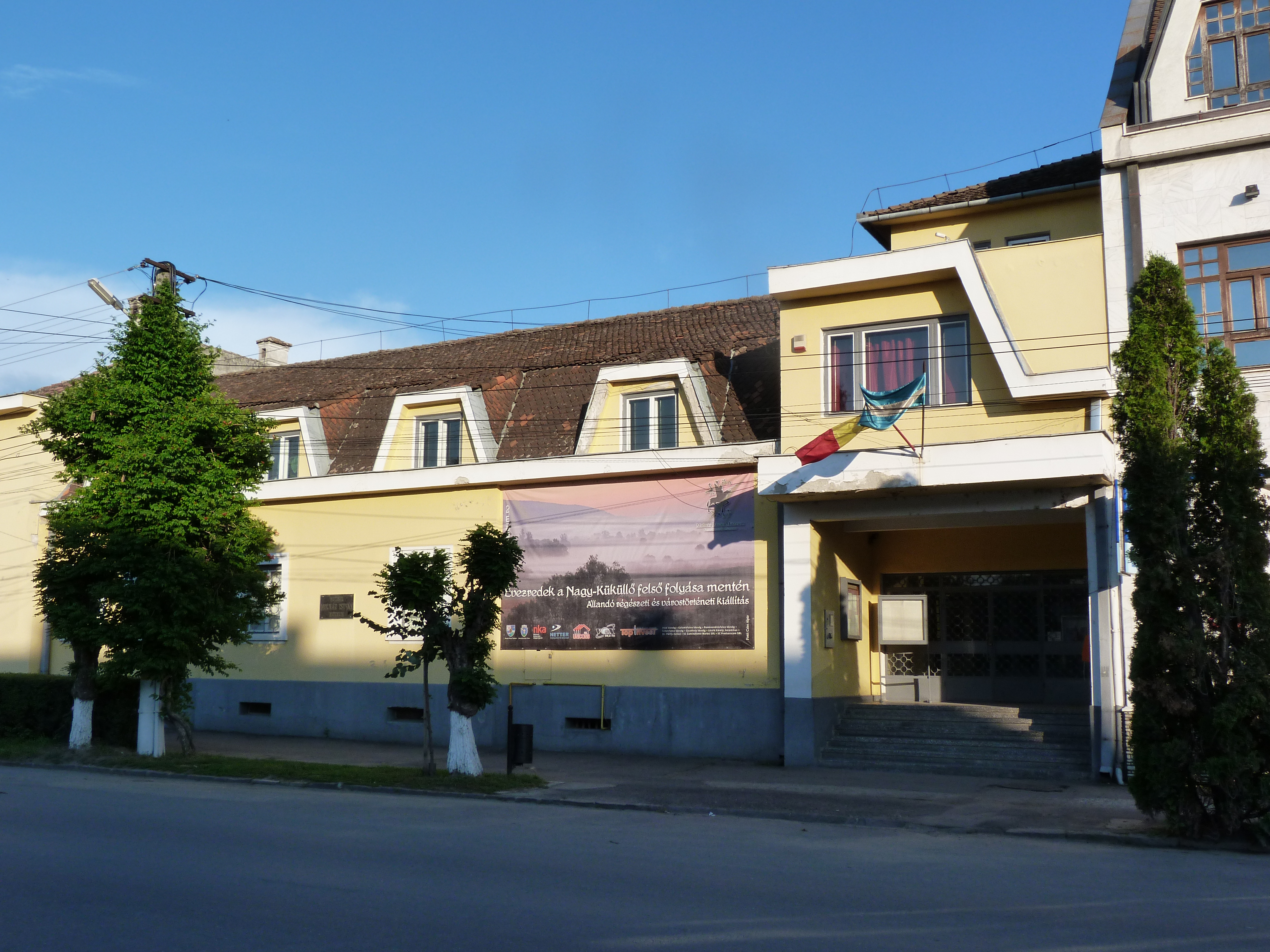 A felvétel 2013. június 16 -án készült Székelykeresztúron. Molnár István Múzeum. ©© Published under Creative Commons in the Metapolisz DVD line. All of the photos and vids in the Metapolisz DVD line are under Creative Commons and can be used even for commercial – for profit – purposes. Recommended Citation Derzsi Elekes Andor: Metapolisz DVD line